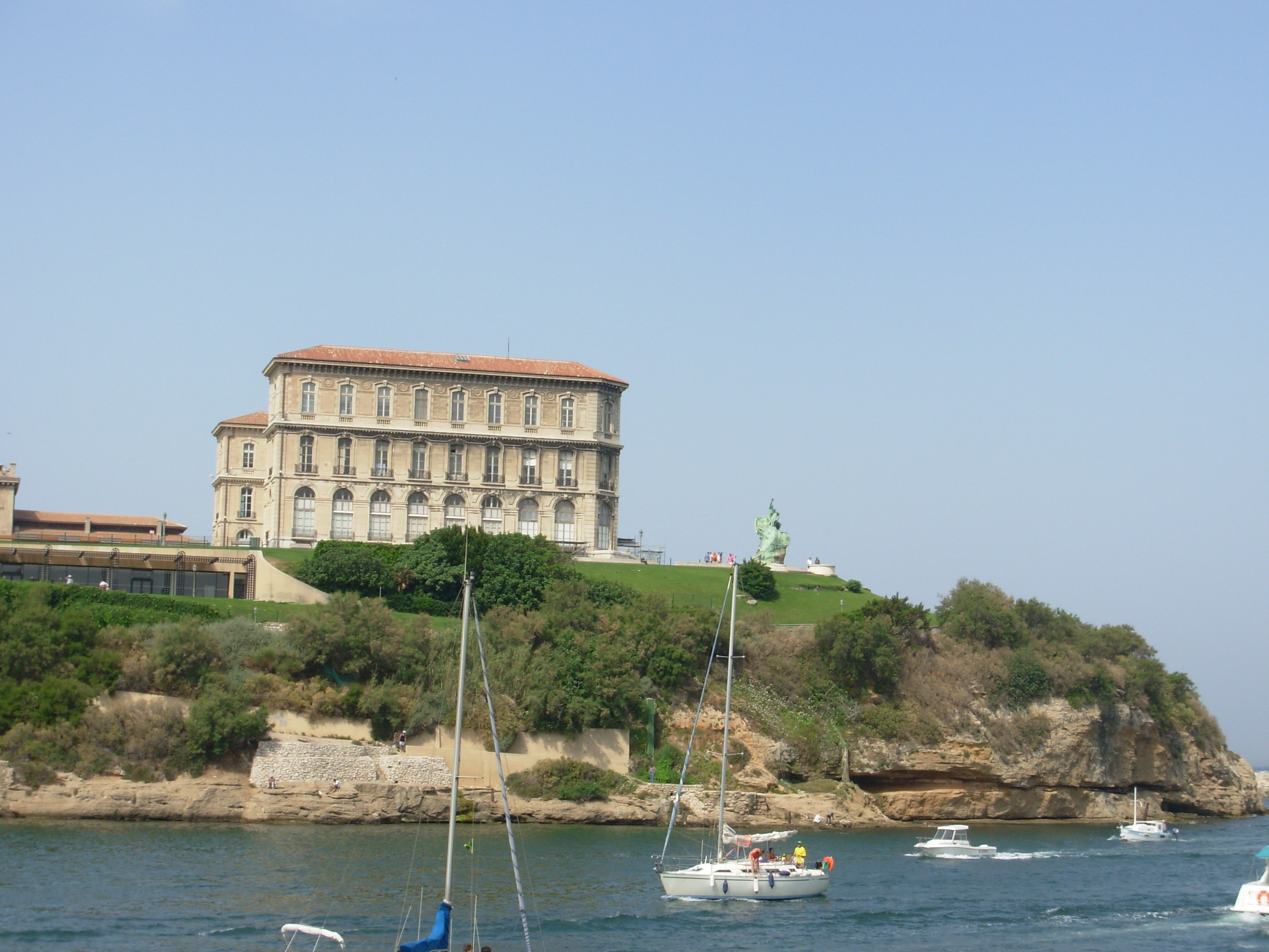 Le Pharo, Marseille, France